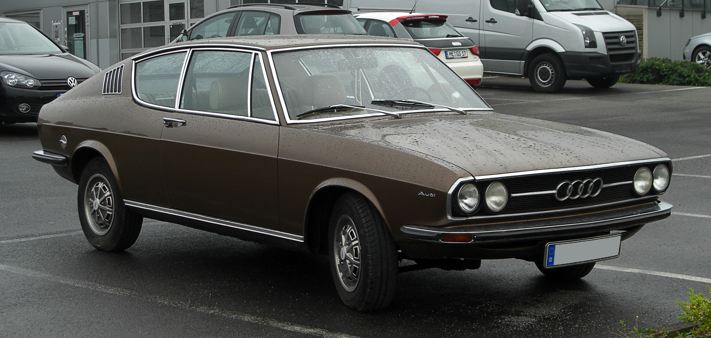 Audi 100 Coupé S (C1)